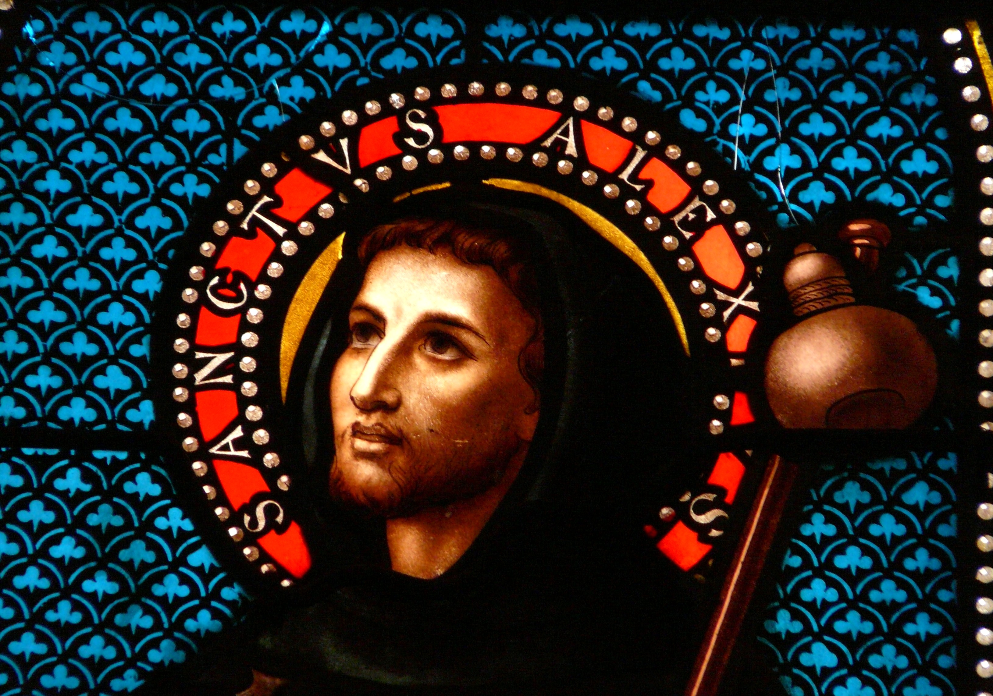 Saint Alexis, détail d'un vitrail de l'église Saint-Pierre-ès-Liens, Pomport, Dordogne, France.